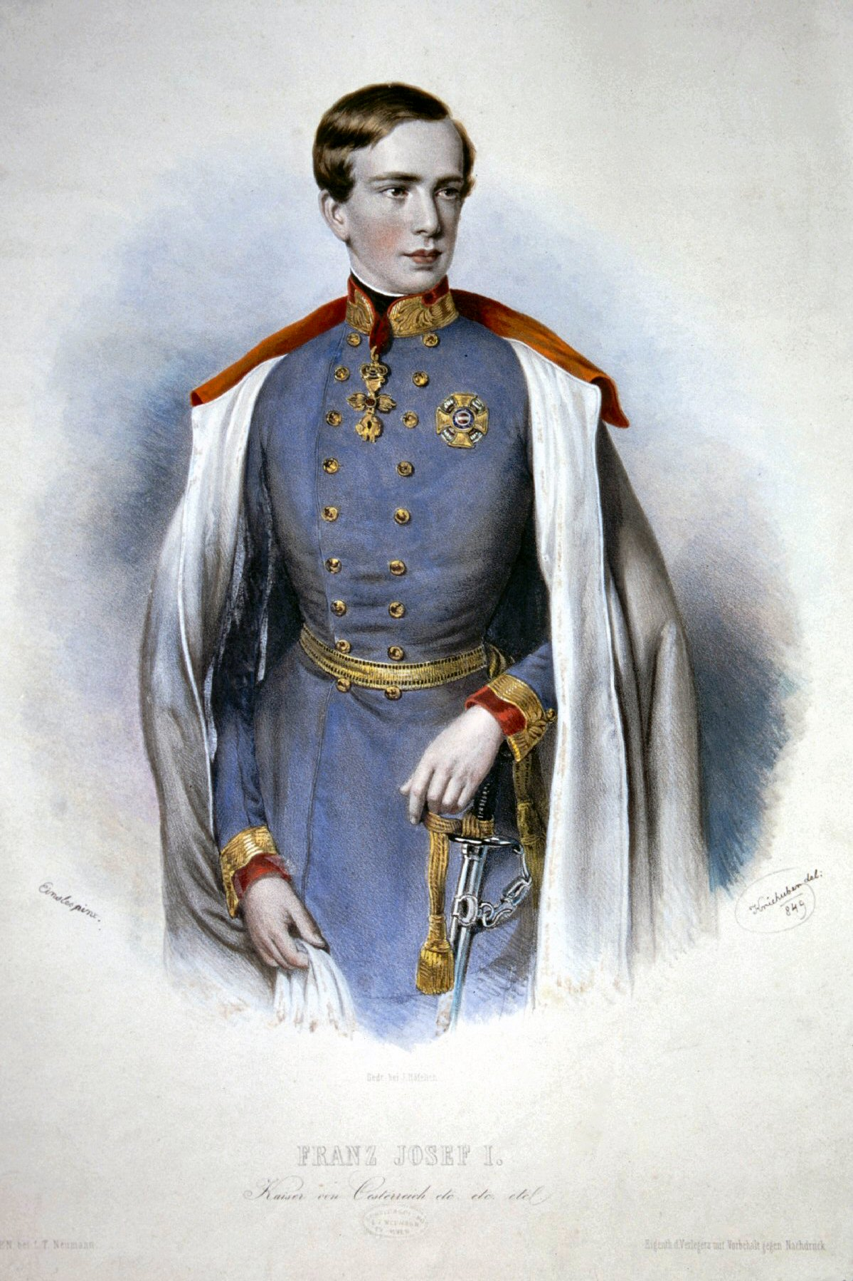 Franz Josef I. (1830-1816), Kaiser von Österreich, König von Ungarn Lithographie von Josef Kriehuber, 1849, nach einem Gemälde von Einsle